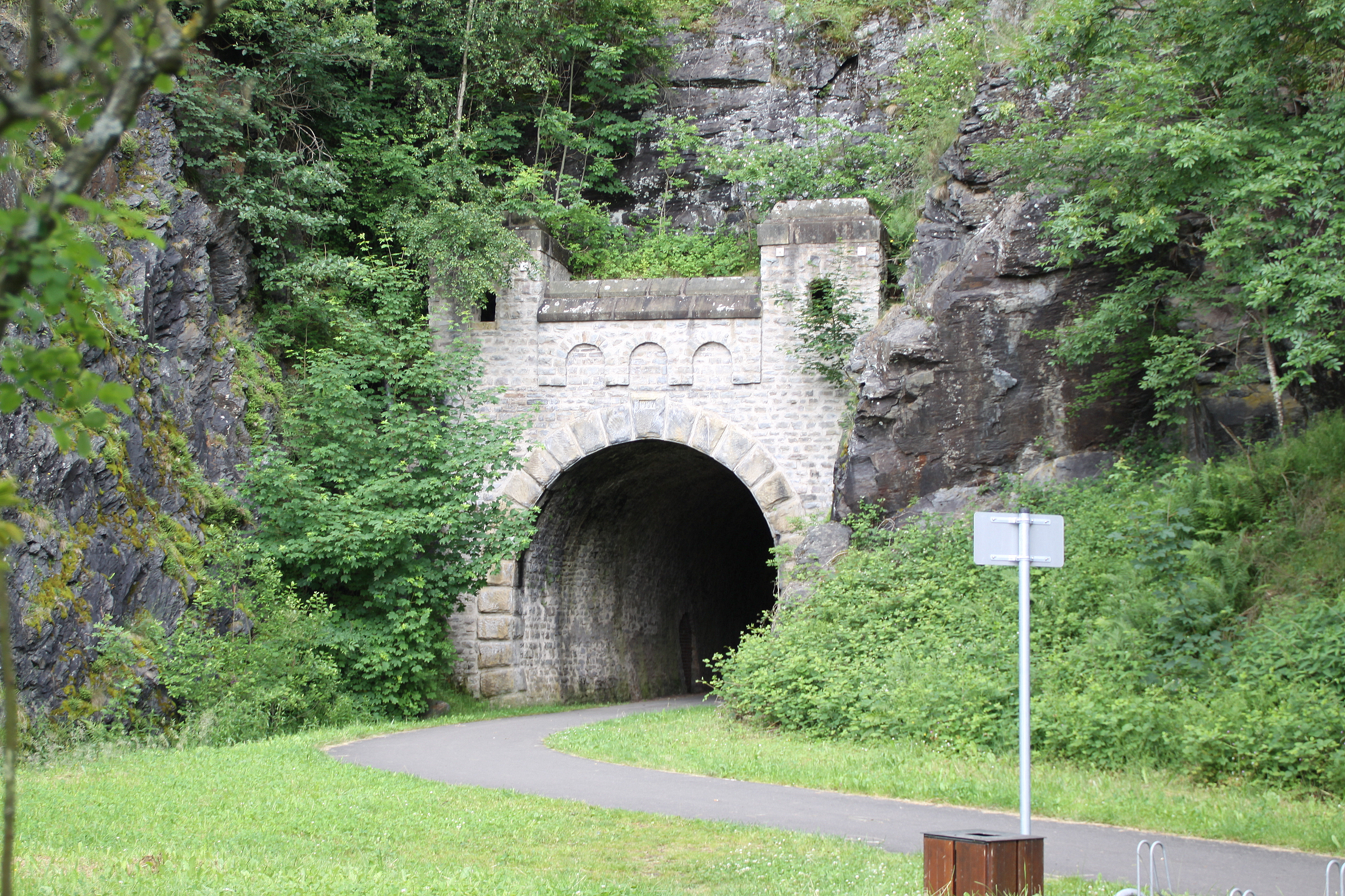 Den Tunnel an der Neierbuerg (Kapp Neierbuerg) op der Streck Pronsfeld-Neierbuerg